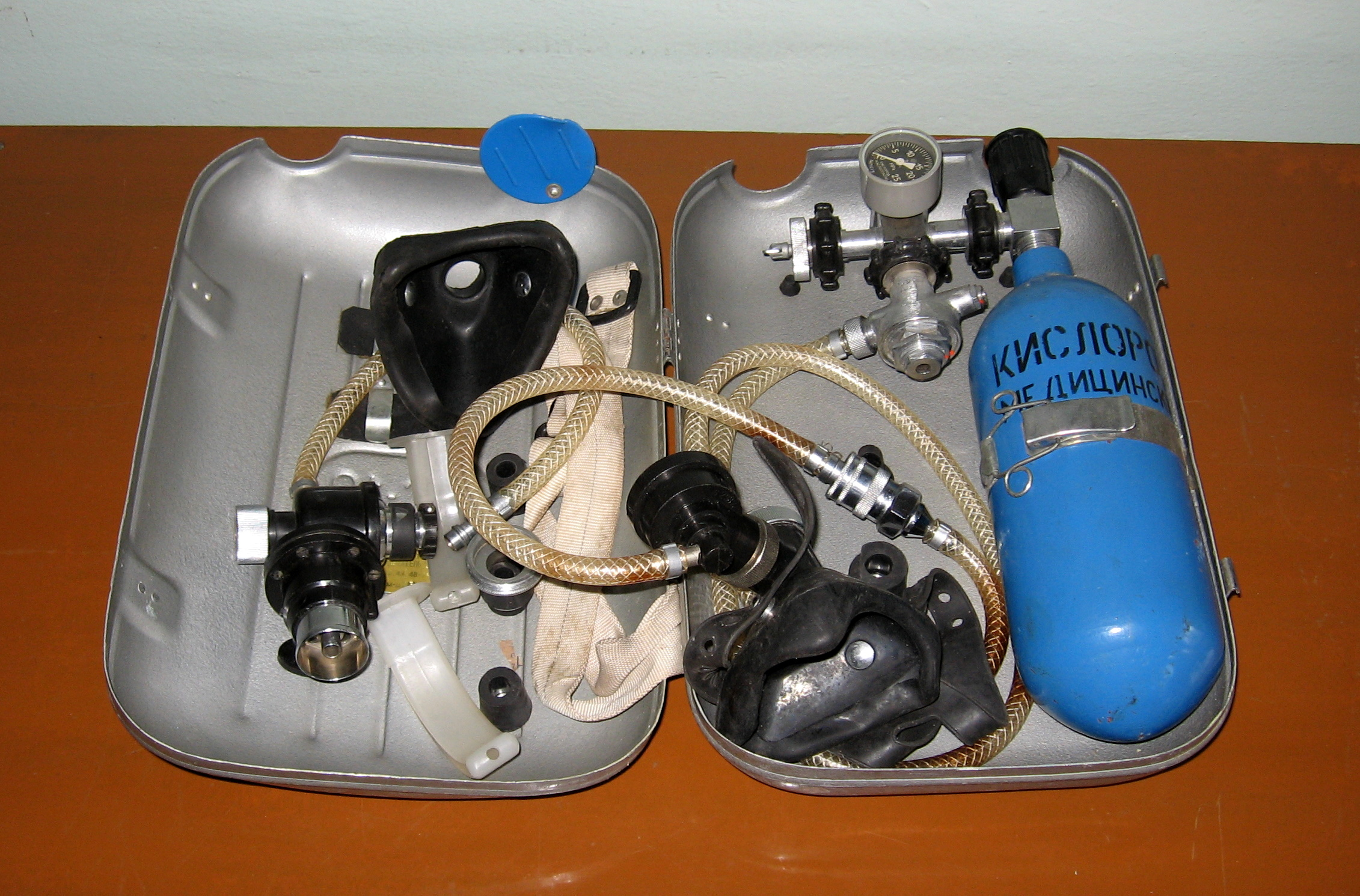 Используется горноспасателями